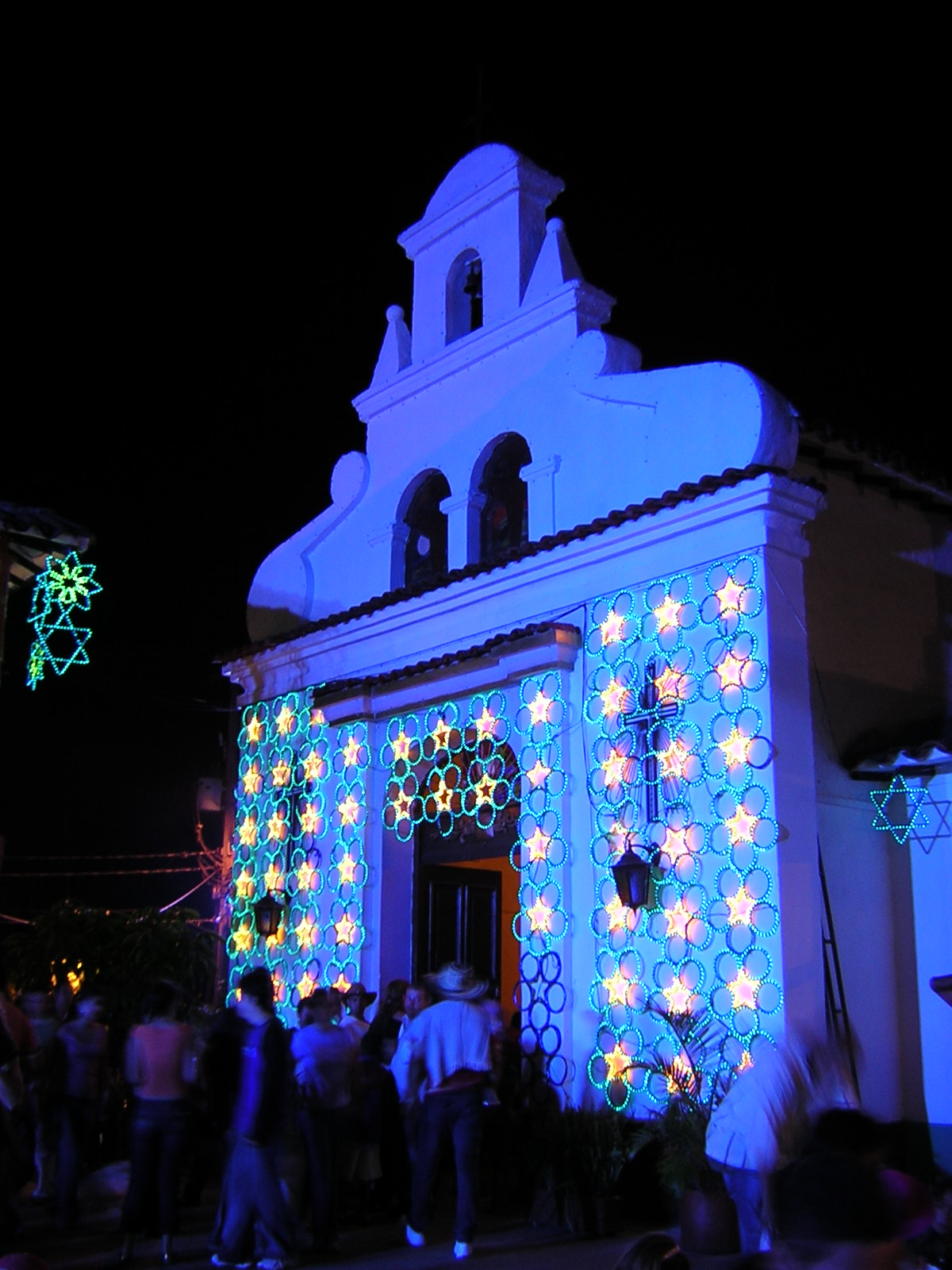 Pueblito Paisa en el Cerro Nutibara, Navidad 2006, Medellín, Colombia